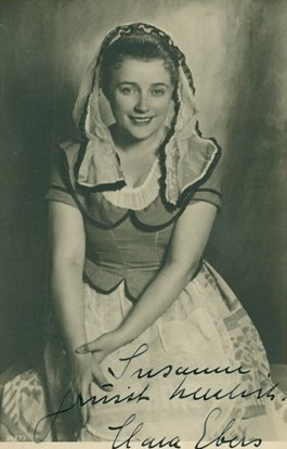 Оперната артистка Клара Еберс в ролята на Сузана от „Сватбата на Фигаро“ на Моцарт.